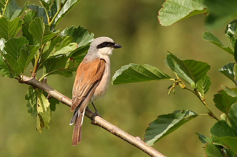 Neuntöter (Lanius collurio), Männchen